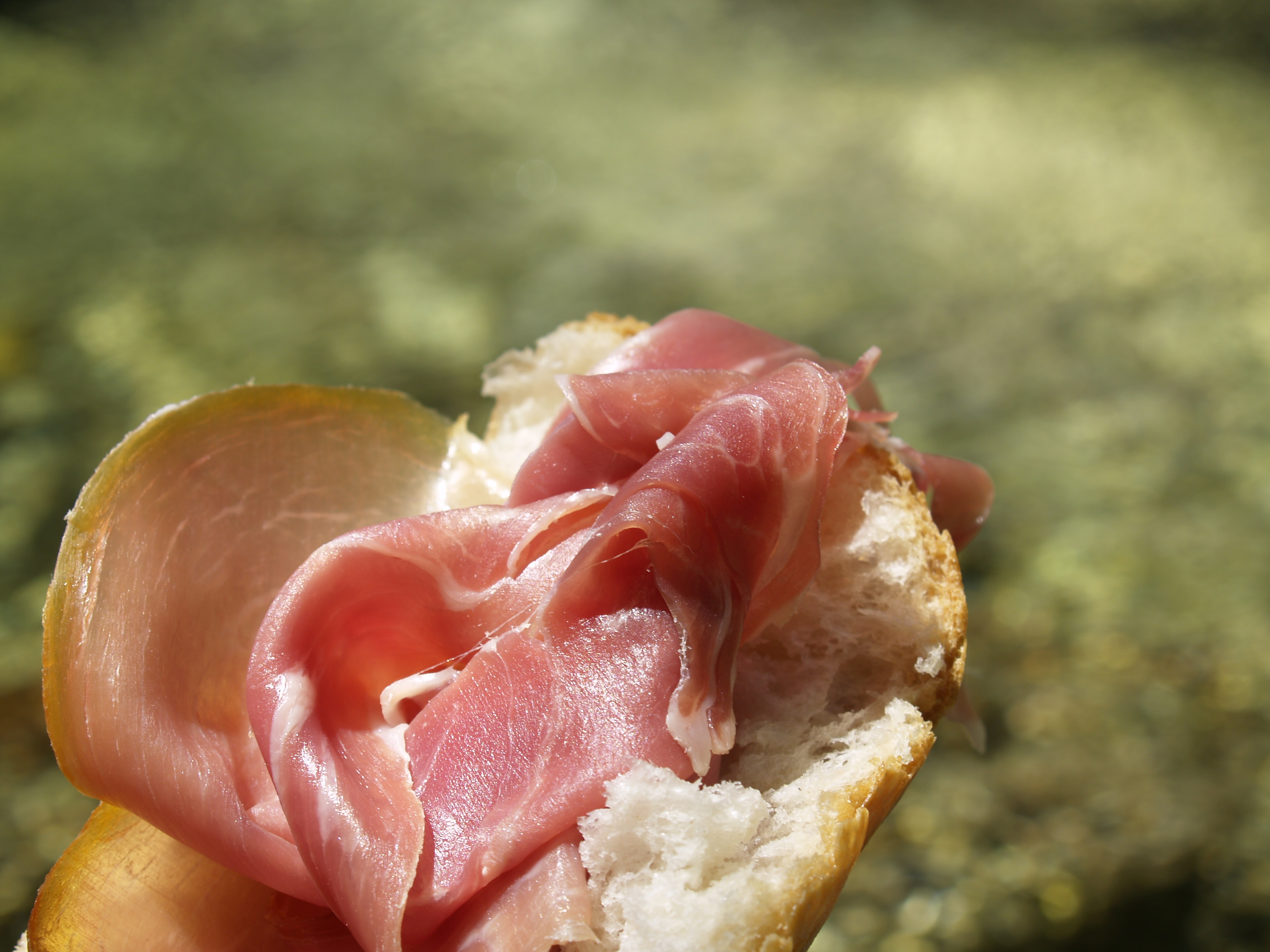 Brød med skinke